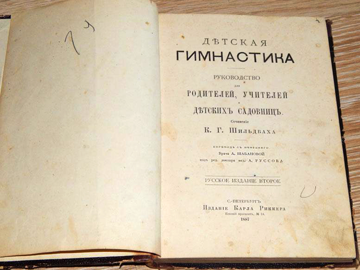 Шильдбах К. Детская гимнастика: Руководство для родителей, учителей и детских садовниц. 1887г. Перевод Д-ра А. Н. Шабановой